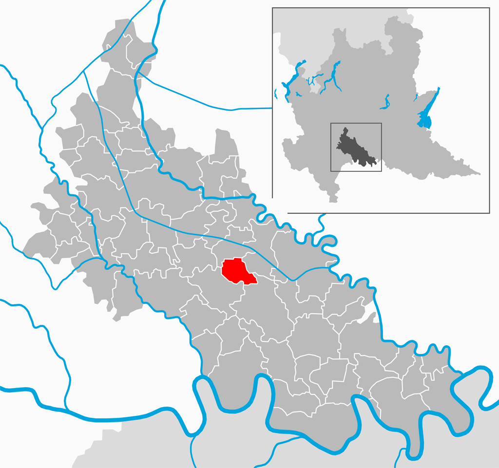 Il comune di Secugnago nella provincia di Lodi